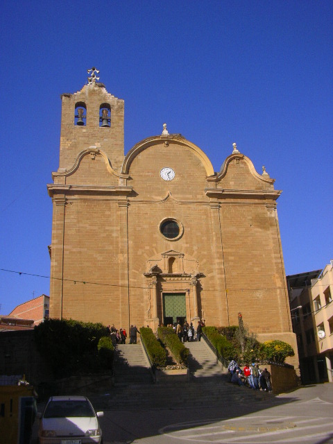 Iglesia parroquial de Alcarràs